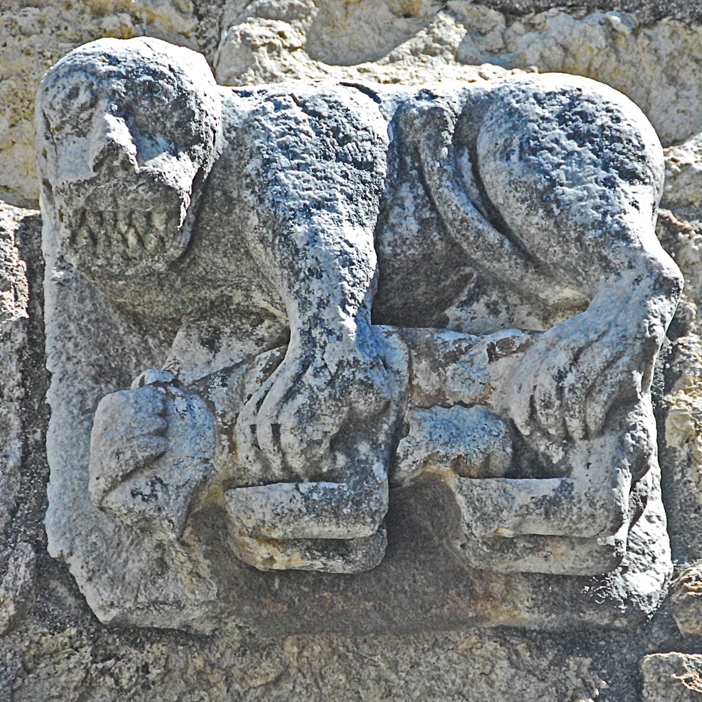 St-André-de-Sorède, fressender Löwe rechts